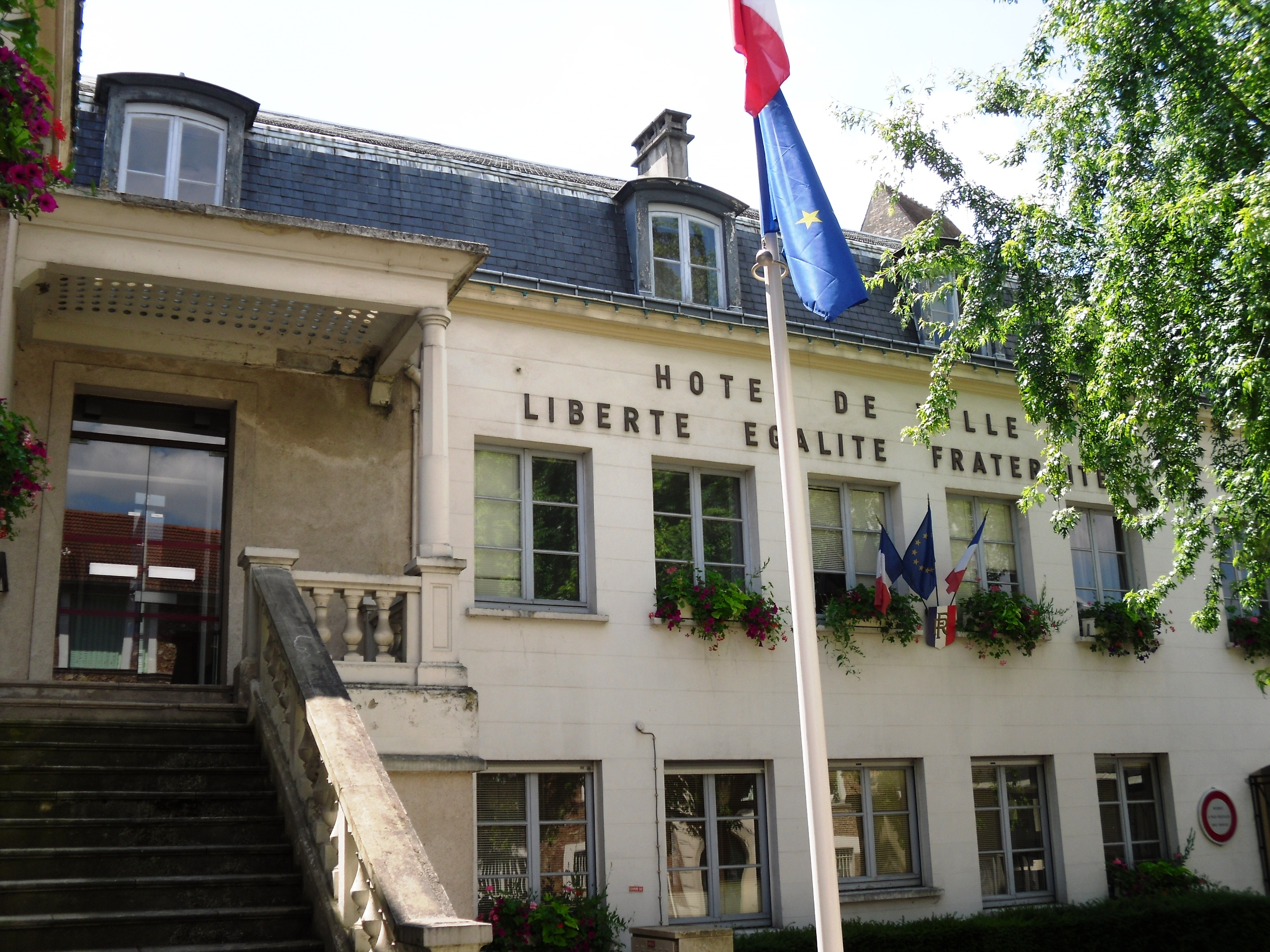 L'hôtel de ville d'Igny (91)